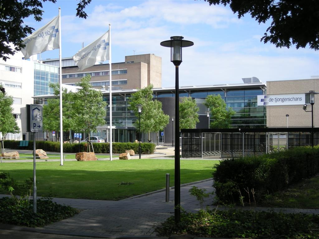 Voer hier een bijschrift toe Voorterrein ziekenhuis Tjongerschans Heerenveen